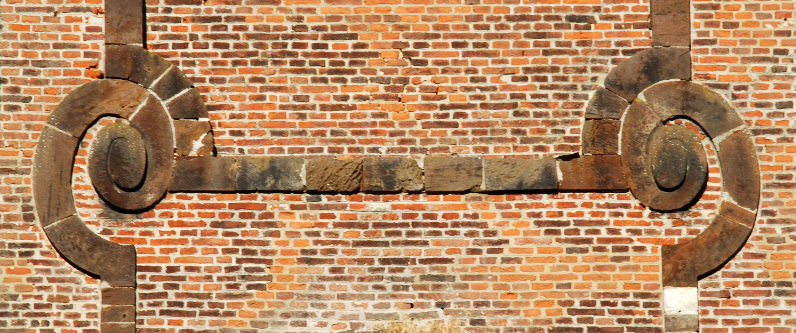 Belgique - Wallonie - Wavre - Église Saint-Martin de Limal